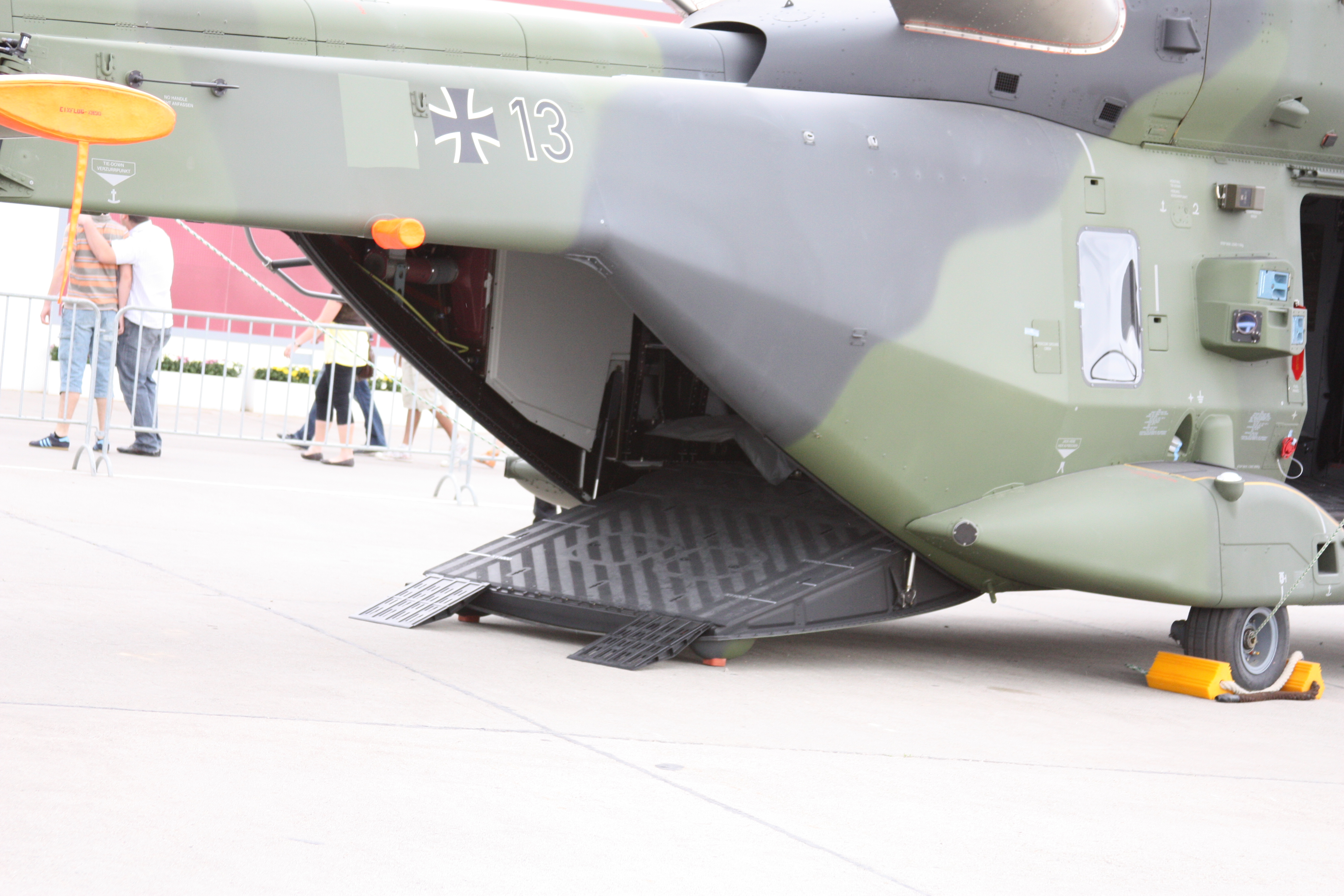 Heckklappe des NH90 TTH. ILA 2010, am Samstag aufgenommen, meist erhöht von einer Leiter fotografiert.